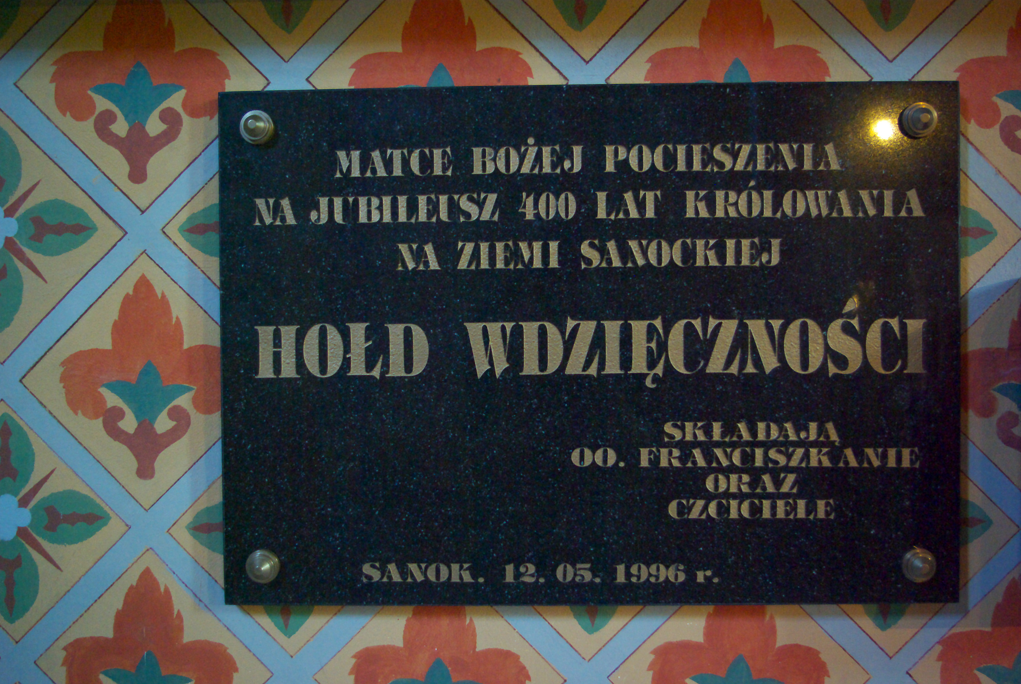 Tablica pamiątkowa w kościele Franciszkanów w Sanoku